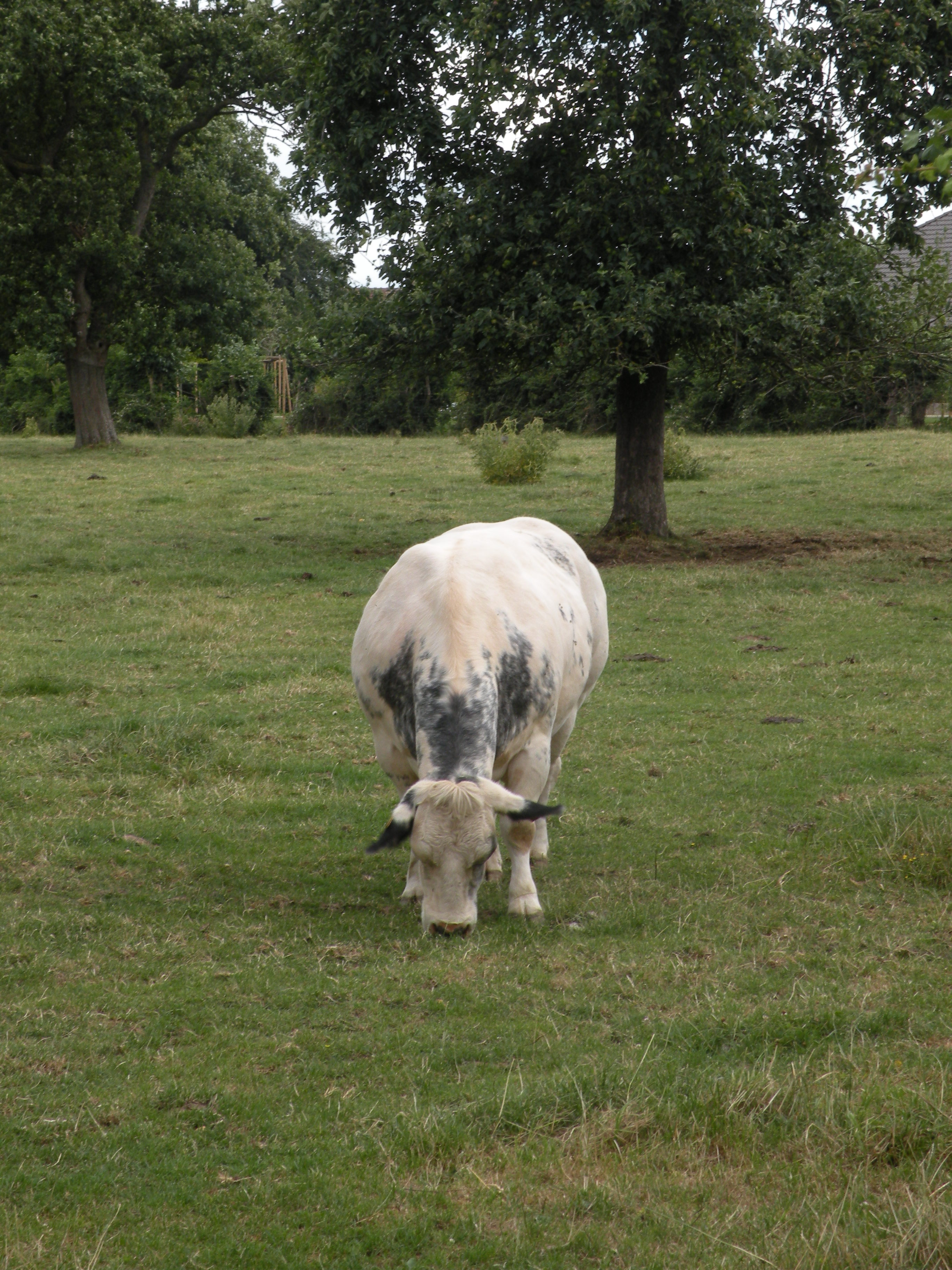 vache bleu